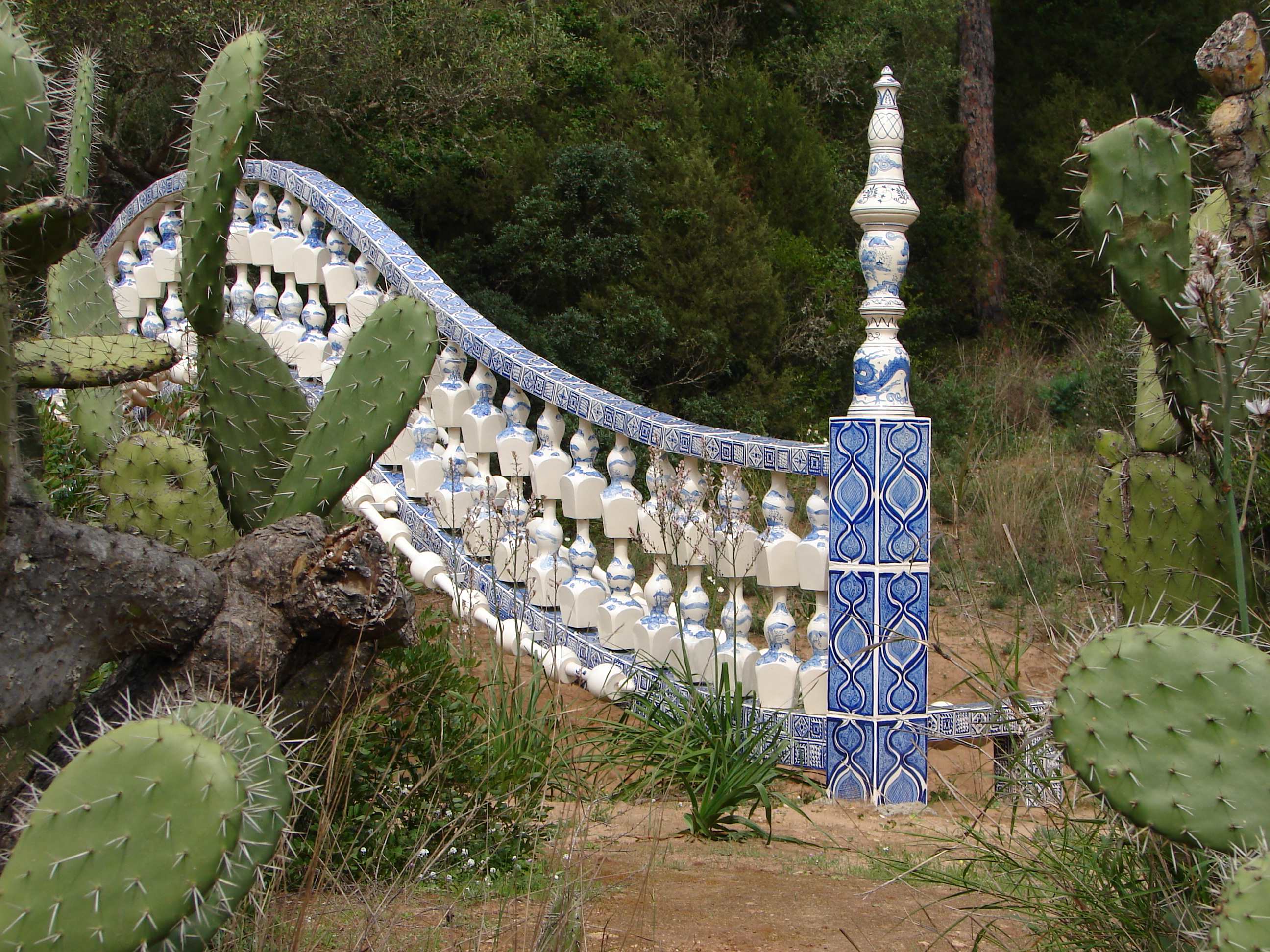 Puente by Shen Yuan at Fundación NMAC